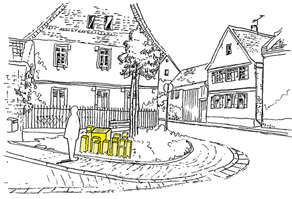 Denkmal für die ermordeten Juden Nordenstadts, 1994